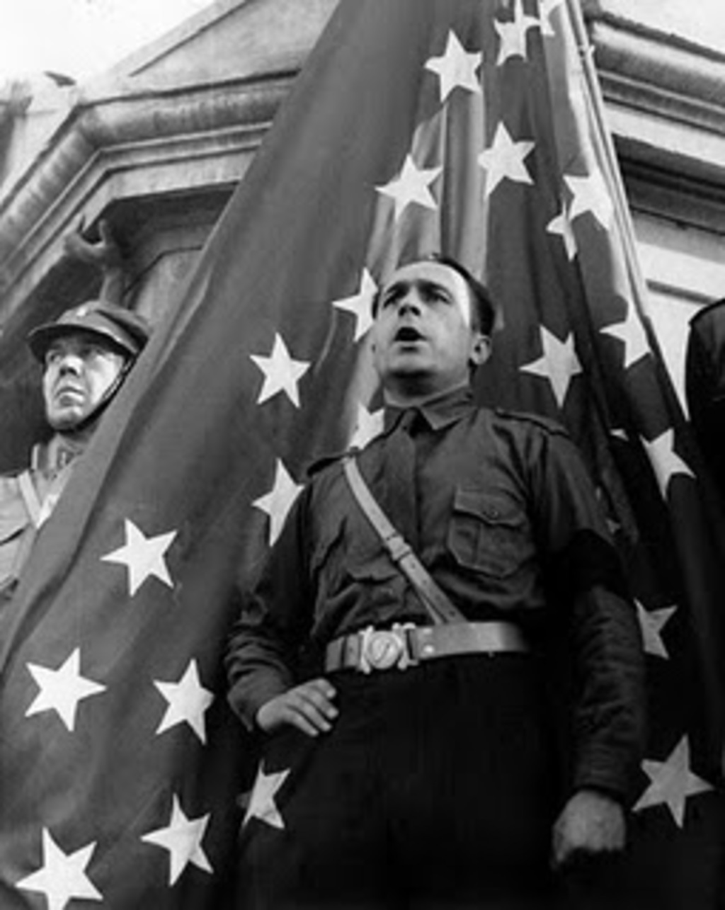 Partido Político creado en 1939, a partir de una reestructuración del Movimiento Nacional Socialista.